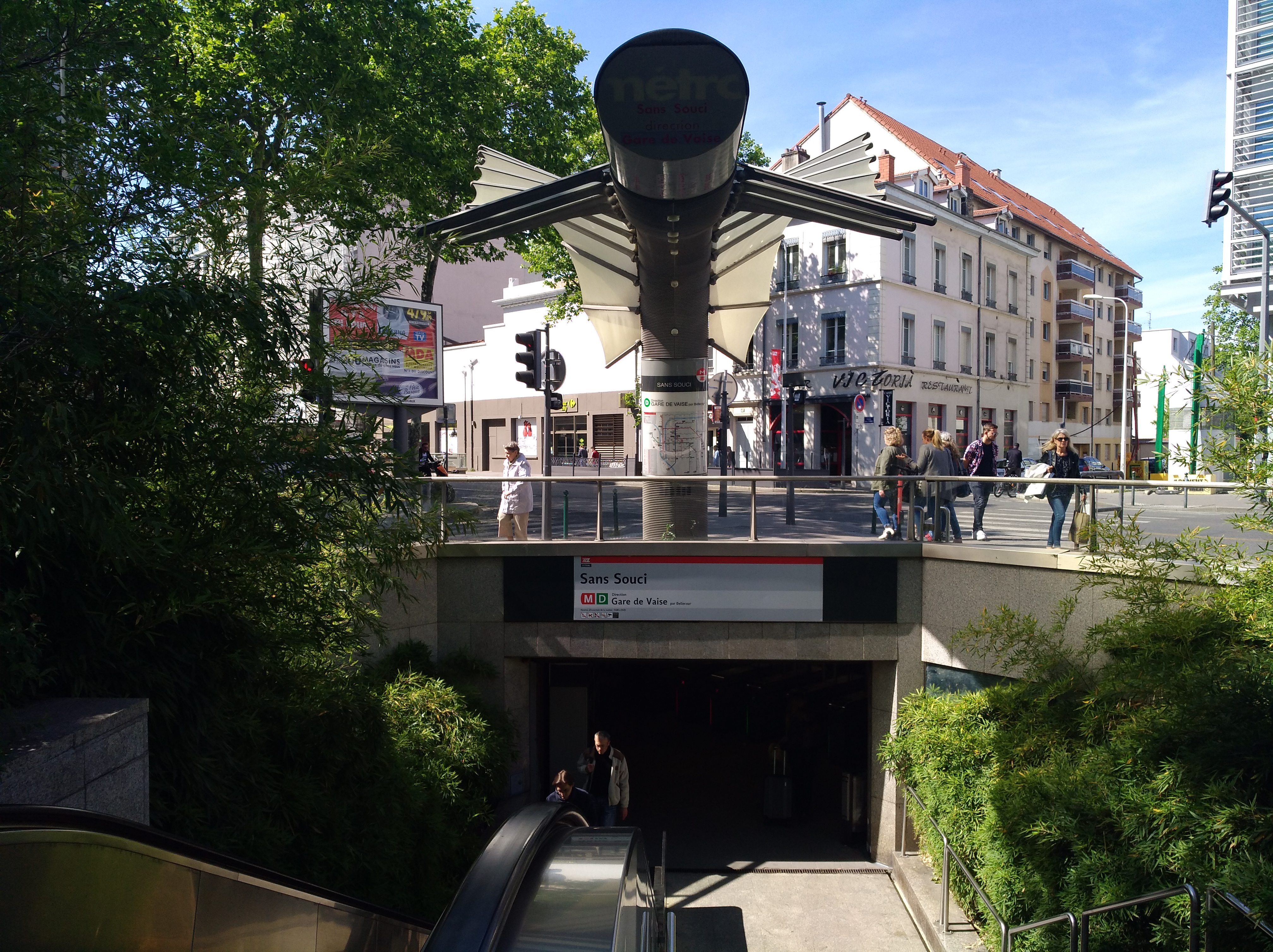 Entrée de la station de métro Sans Souci, dans le 8e arrondissement de Lyon.